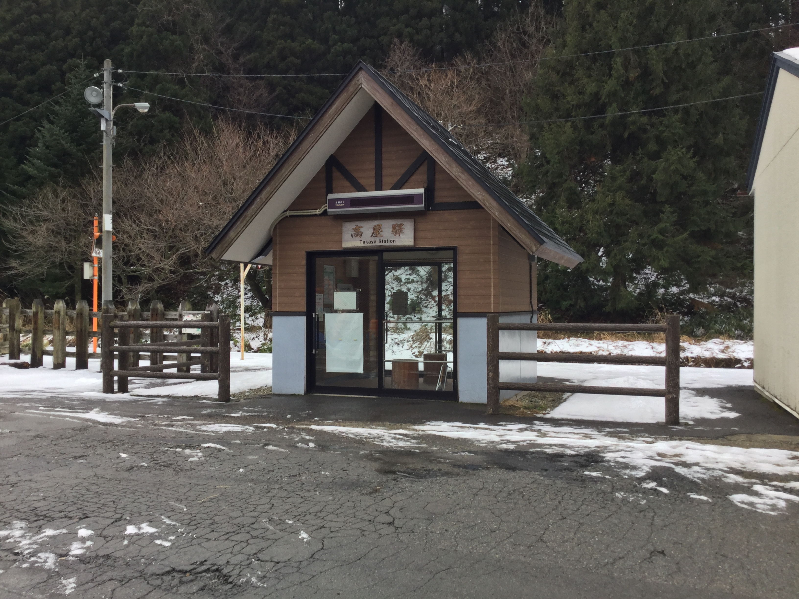 高屋駅待合室